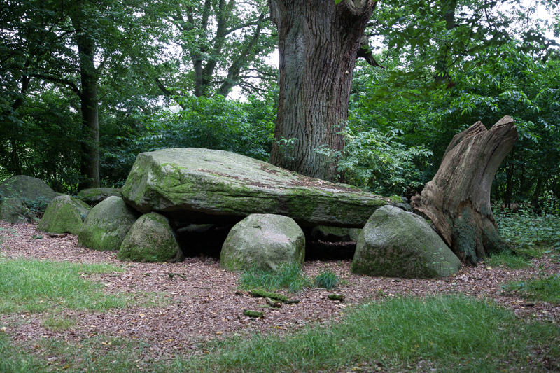 Großsteingrab Heidenopfertisch in Visbek Sprockhoff-Nr. 974